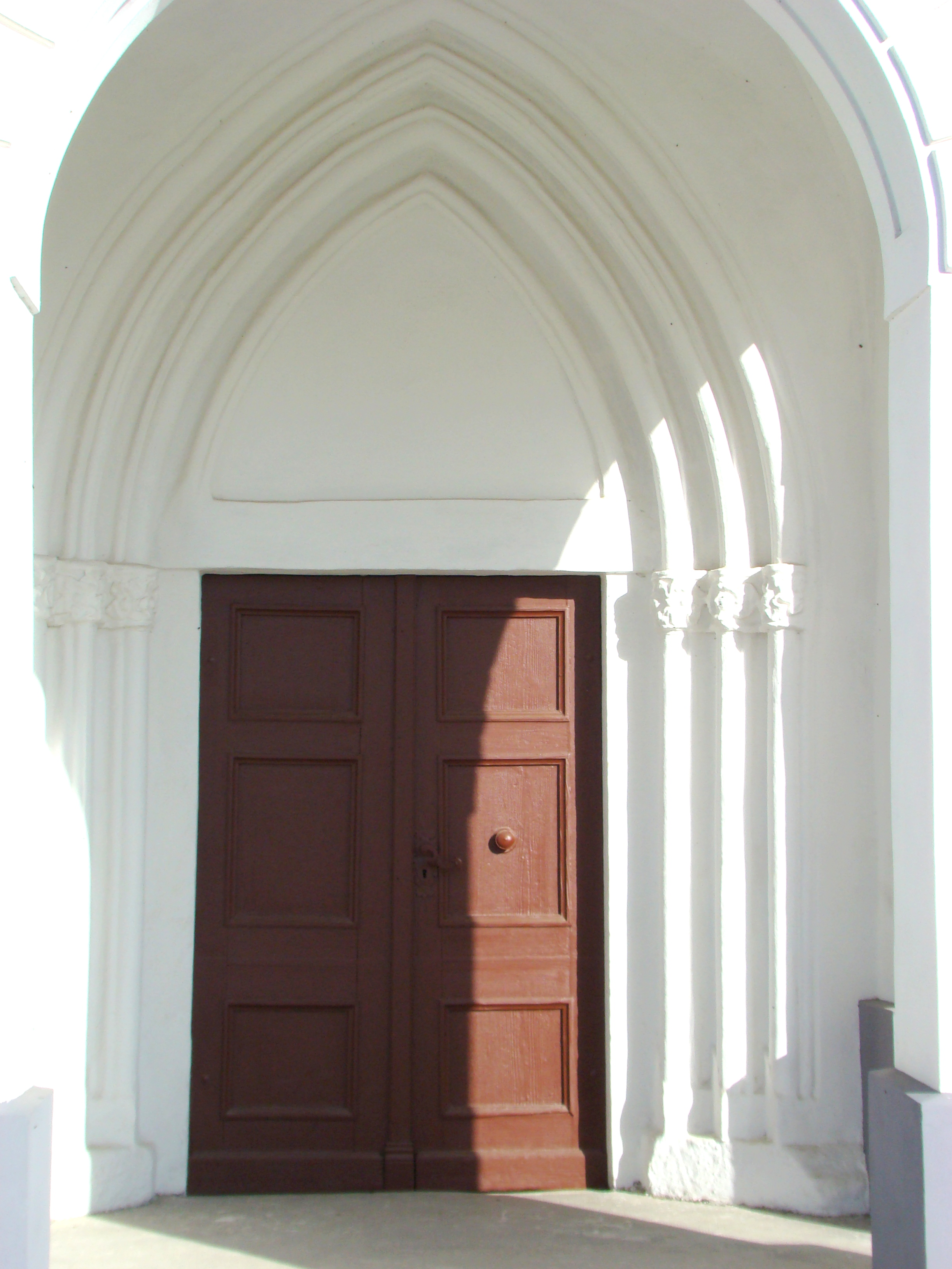 Biserica evanghelică, sat Livezile; comuna Livezile, județul Bistrița-Năsăud